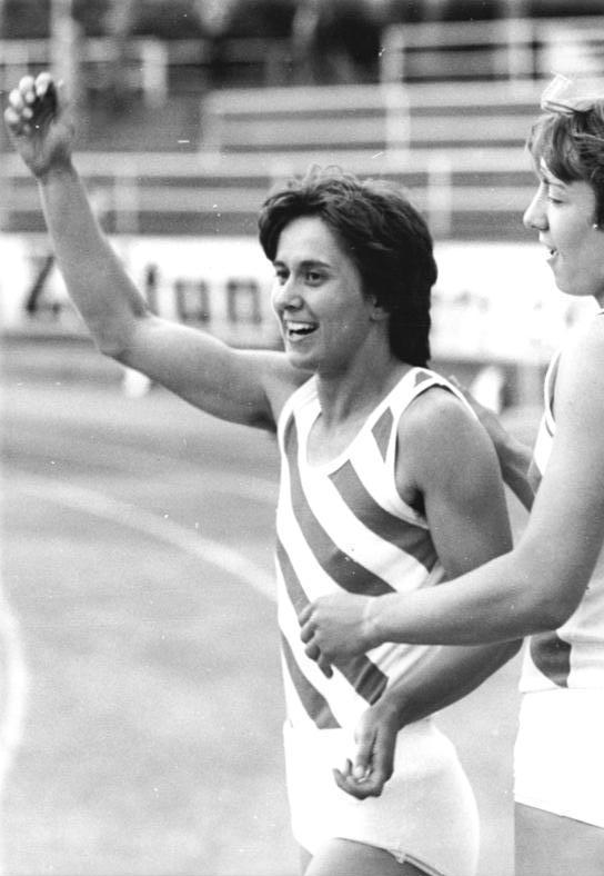 Marlies Göhr, Sabine Rieger ADN-ZB Häßler 01.07.82 Dresden: 33. DDR-Meisterschaften in der Leichtathletik- Über 100 m der Frauen siegte Marlies Göhr (SC Motor Jena-l.) in der sehr guten Zeit von 10,91 s. Rechts ihre Klubkameradin Sabine Rieger, die den sechsten Rang belegte.